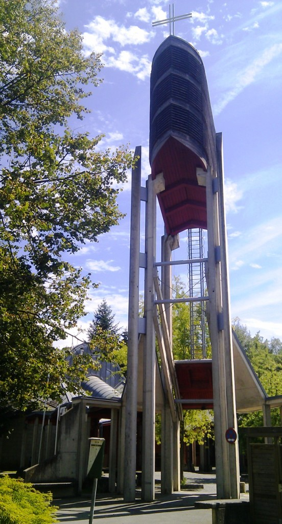 Kirchturm der Bruder-Klaus-Kirche, Graz-Ragnitz